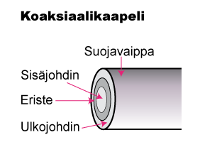 Itse tehty yksinkertainen piirros koaksiaalikaapelin rakenteesta.